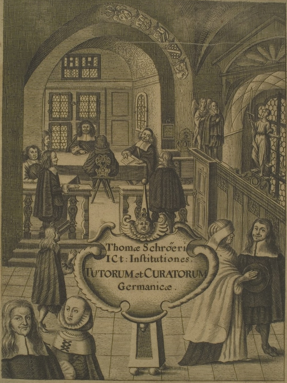 Titelblatt des Buches Institutiones Tutorum et Curatorum Germanicae von Thomas von Schröer.